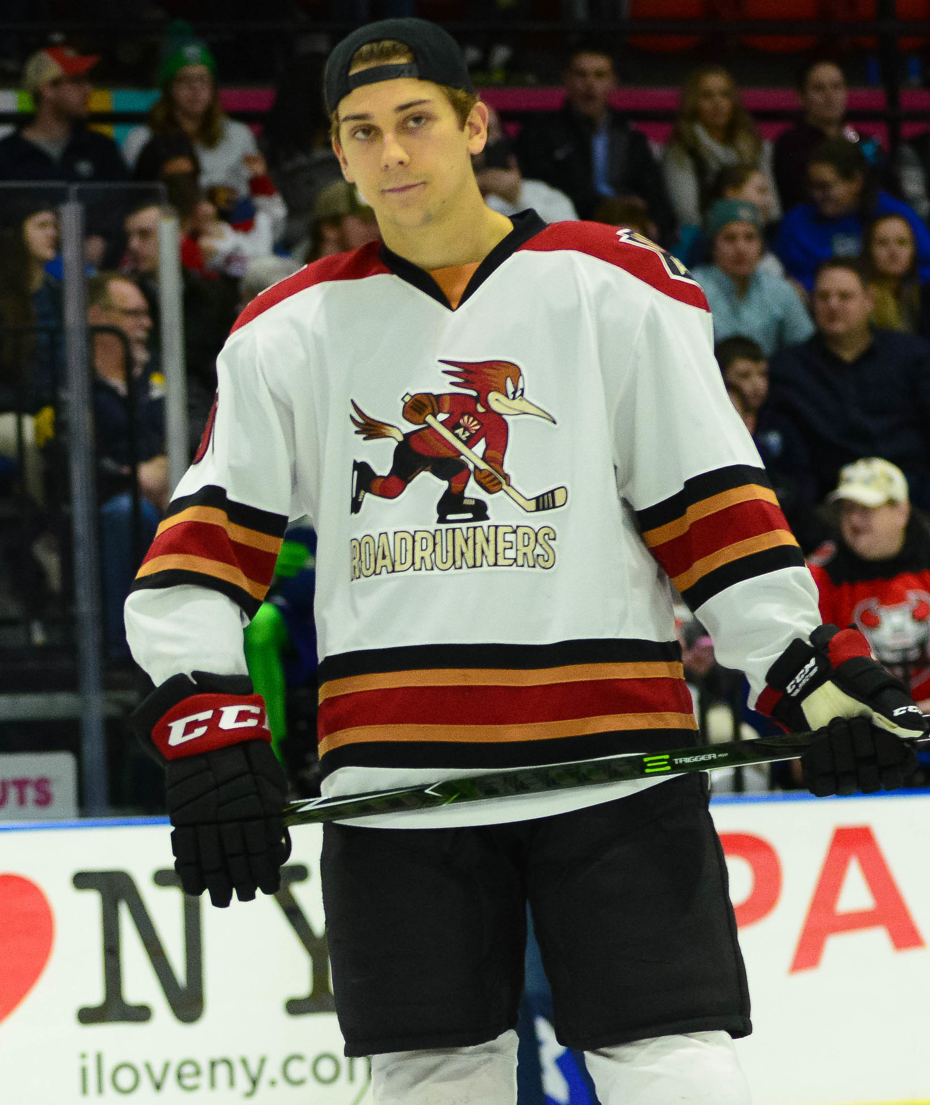 (Bryan Peck/ AHL)